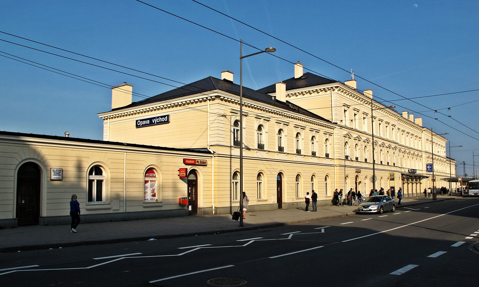 Železniční stanice Opava - Východ, z toho jen: nádražní budova Opava - Východ čp. 691, vodárna s kotelnou (Opava), Jánská 691/1, Opava